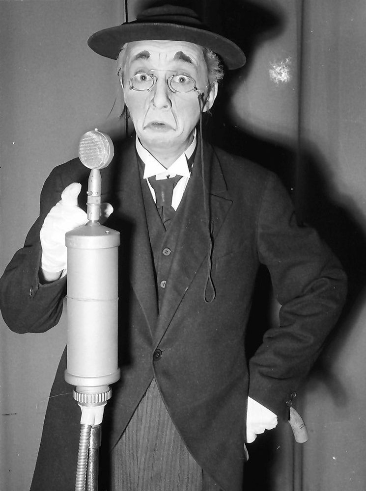 Freiburg: Werner Kroll am Mikrophon